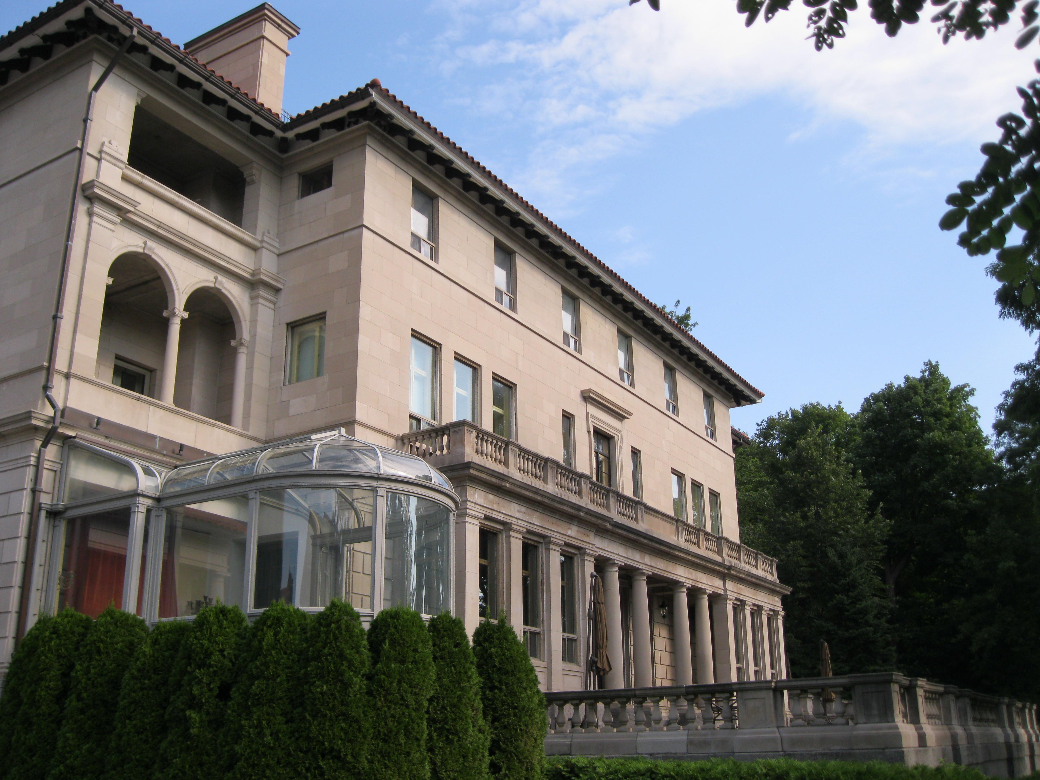 La maison John-Wilson-McConnell, classée monument historique, est une résidence de type villa italienne, mais de style Beaux-Arts. Sa construction a été réalisée en deux phases, la première en 1913-1914 et la seconde en 1924-1925. Elle est située au 1475, avenue des Pins Ouest, dans l'arrondissement Ville-Marie, à Montréal.